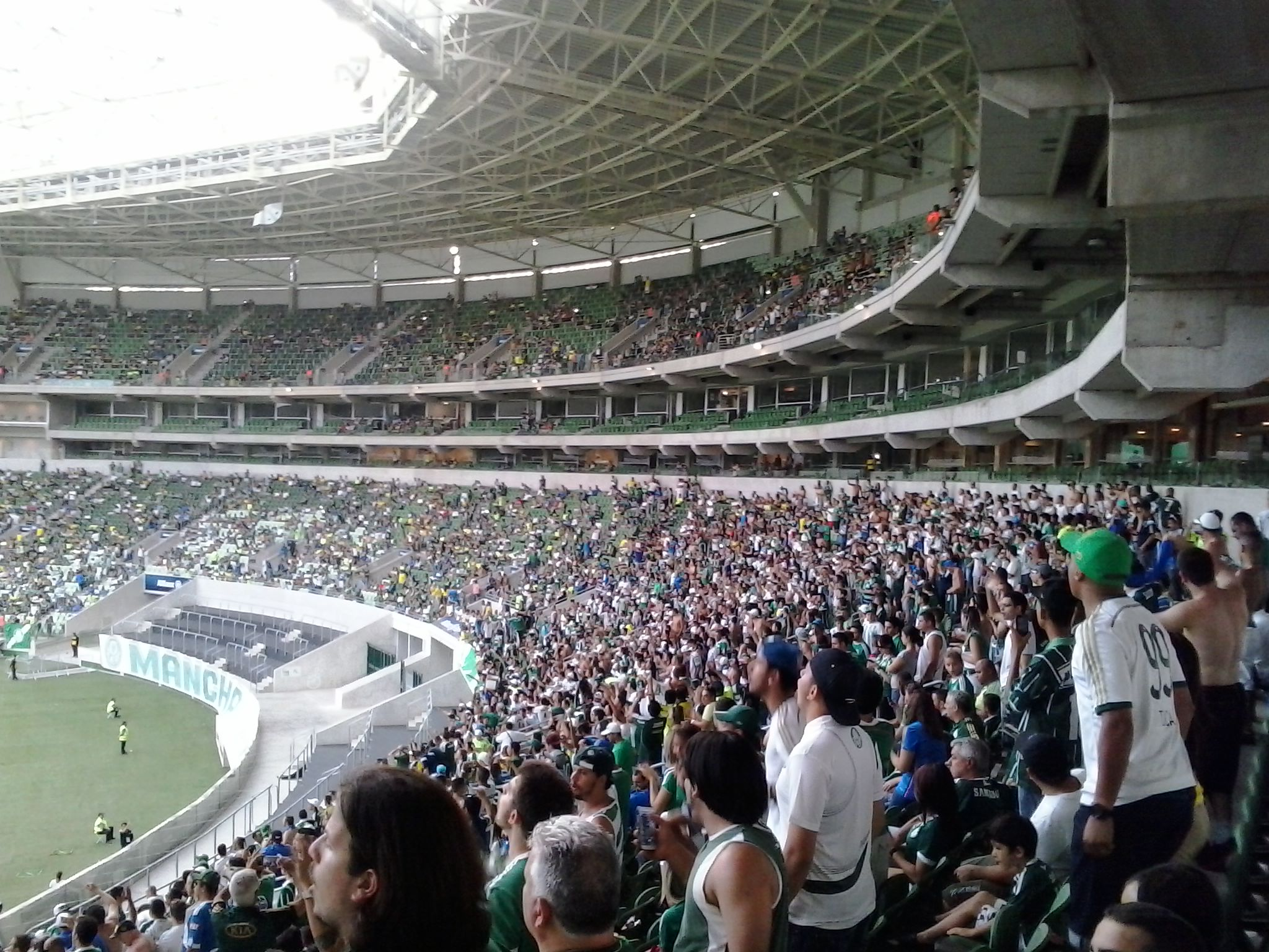 Allianz Parque - Setor Gol Norte